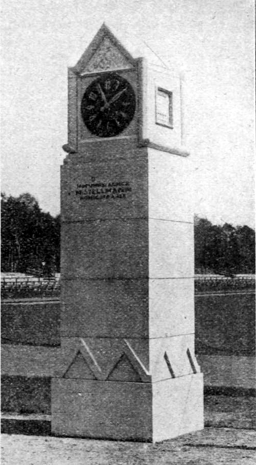 1922 nach Plänen von Stadtbaudirektor Senator Paul Wolf errichtete und von dem Hofuhrmacher M. Stellmann gestiftete Monumentaluhr im damaligen "Stadion der Stadt Hannover", dem später von dem Sportverein Hannover 96 genutzten Eilenriedestadion ...